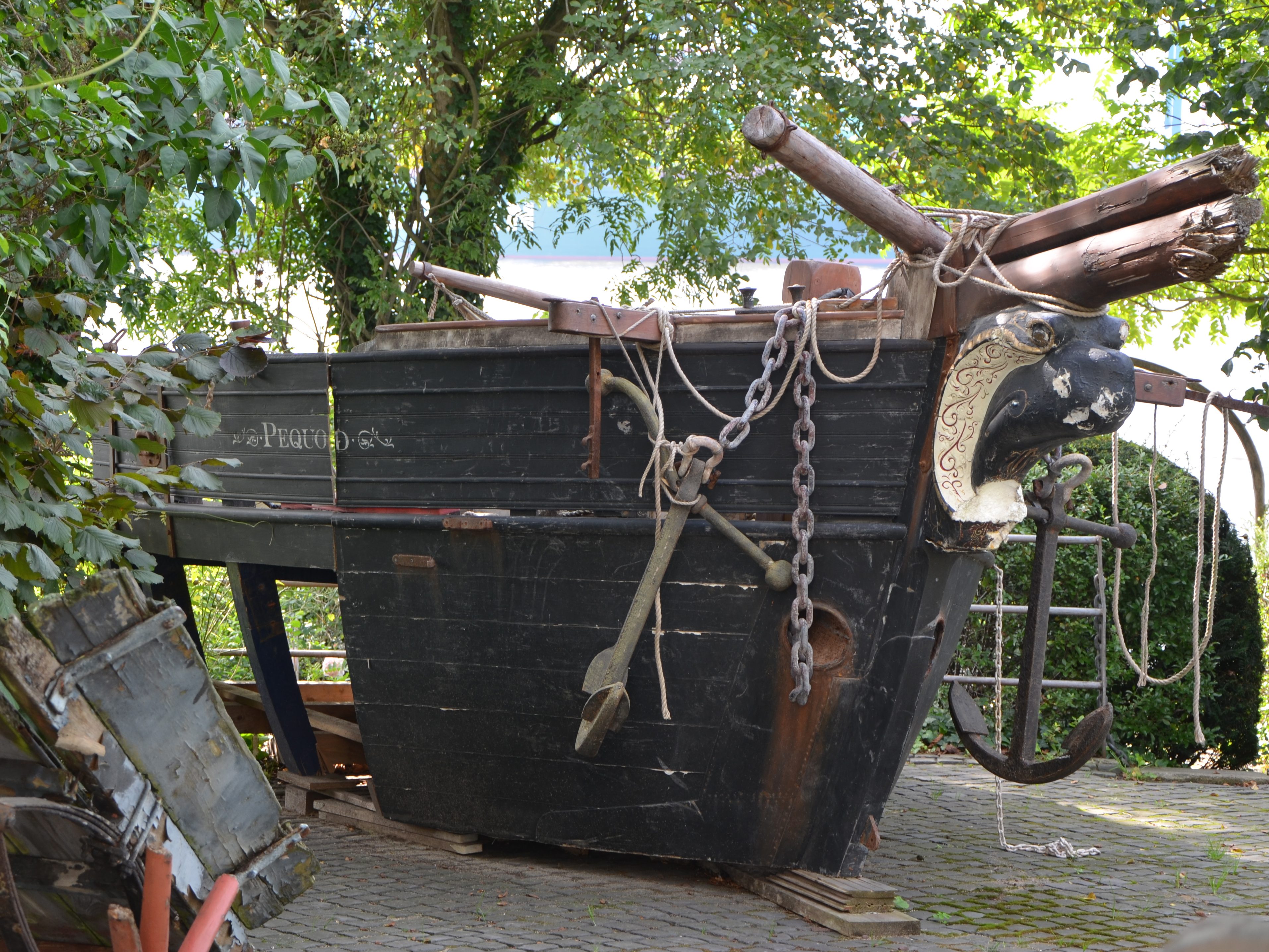 Pequod, Requisite für die TV-Serie Moby Dick (2011) - aufgestellt an der Övelgönne Hamburg